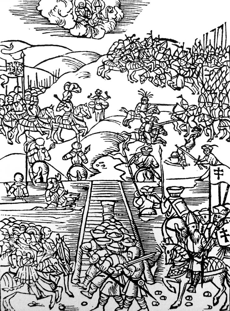 Беларуская (тарашкевіца): Аршанская бітва (Aršanskaja bitva), з брашуры А. Крыцкага